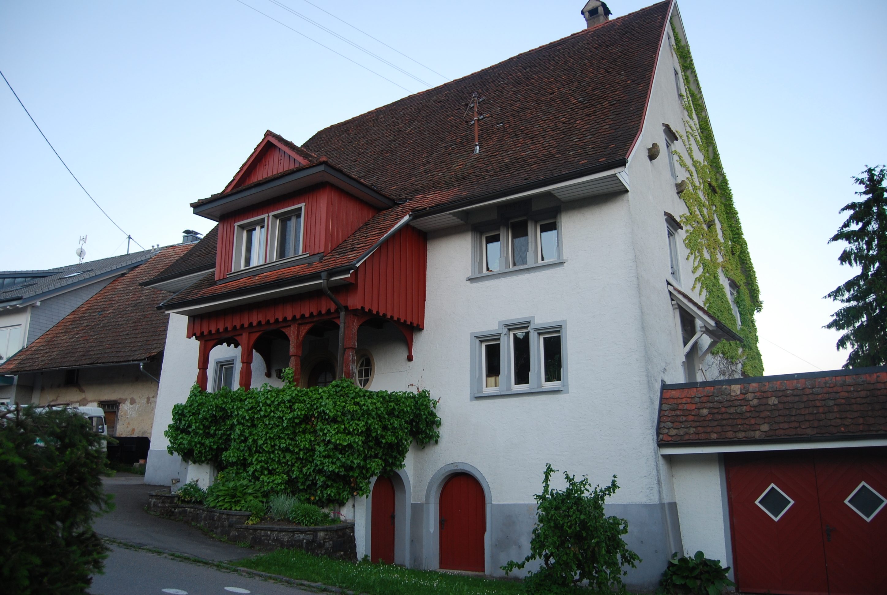 Stiftsgebäude „Salpetererhaus“ Birkingen